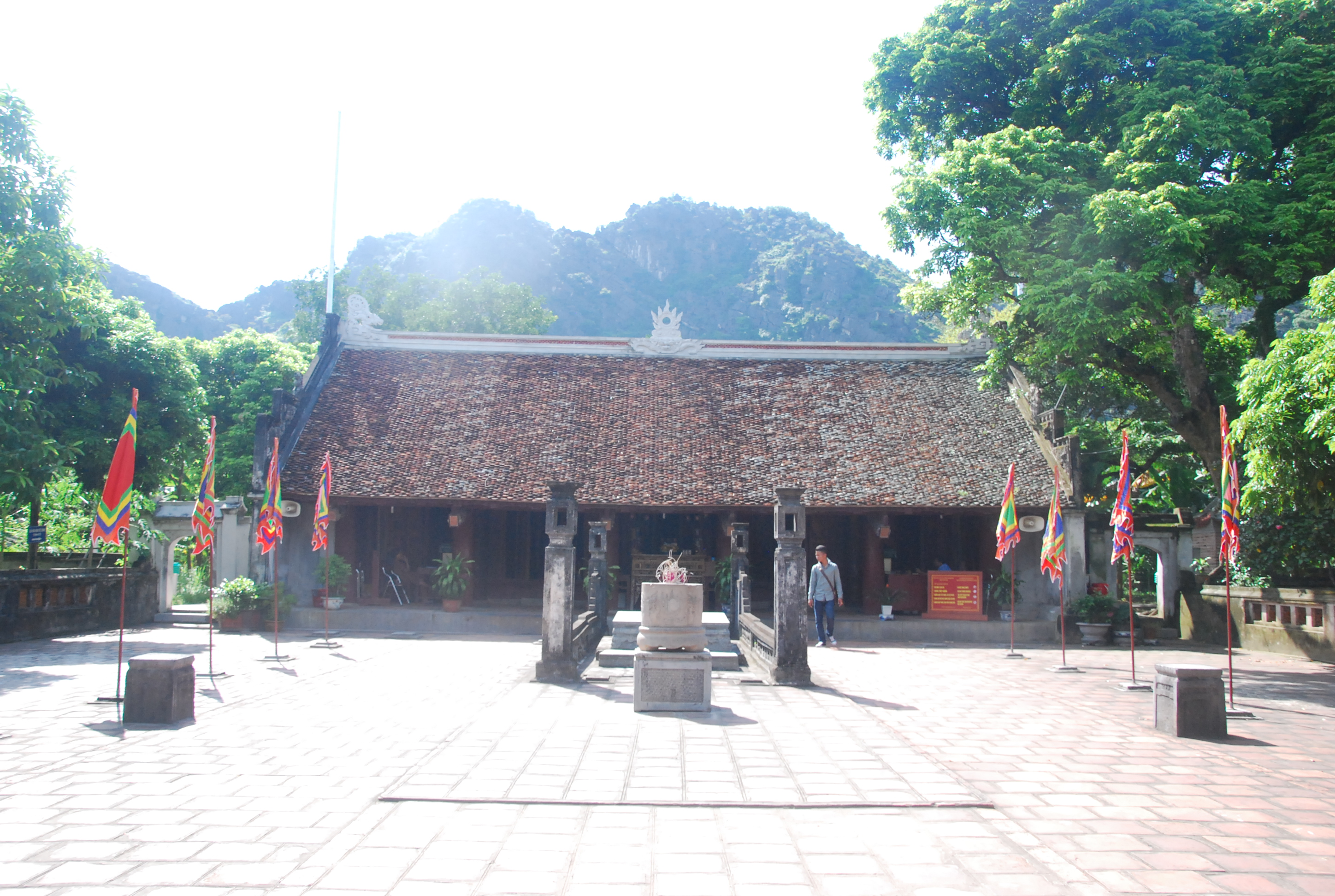 Phong cảnh đền Vua Lê Đại Hành trong Quần thể di tích Cố đô Hoa Lư ở Ninh Bình